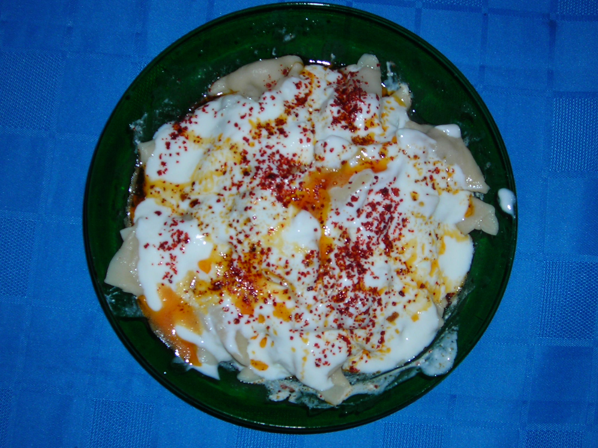 Rumeli usulü üçgen mantı